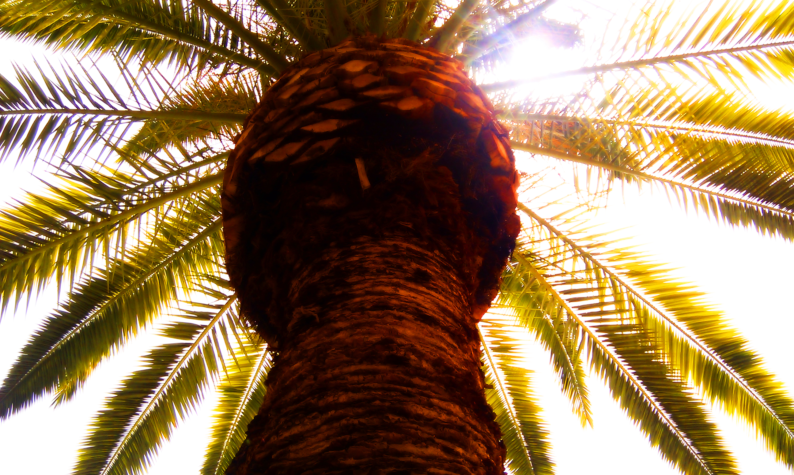 شهر شیراز